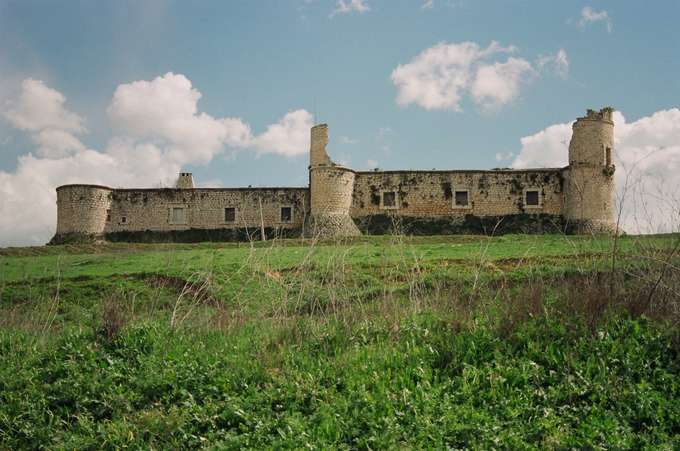 Ruinas del castillo de Chinchón (Madrid).